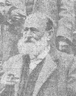 Llegada de Lerroux a Madrid.